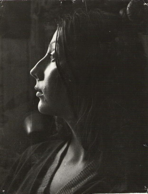 Художник Юлия Долгорукова